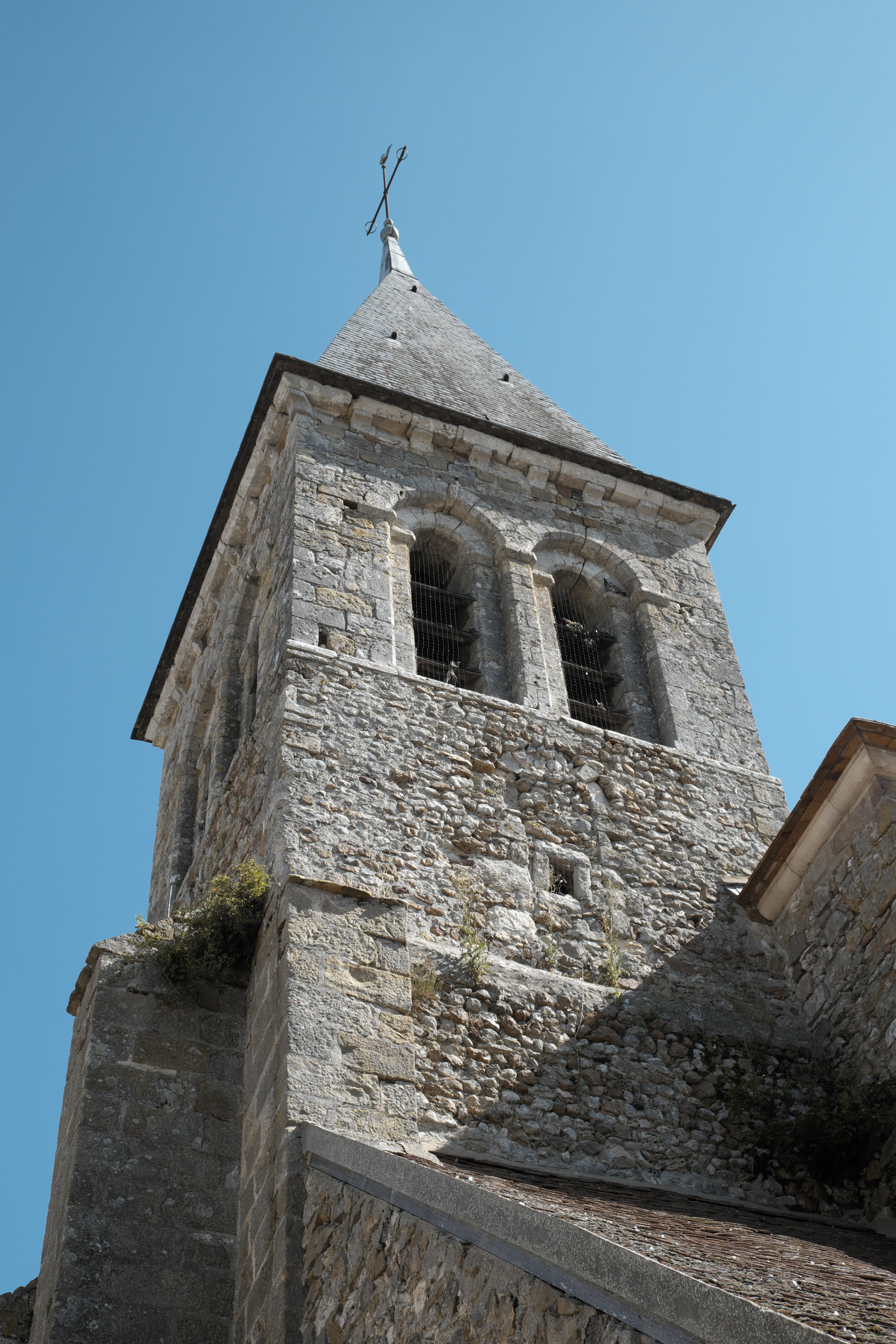 Kirche Saint-Pierre in Donnemarie-Dontilly im Département Seine-et-Marne (Île-de-France/Frankreich), Turm